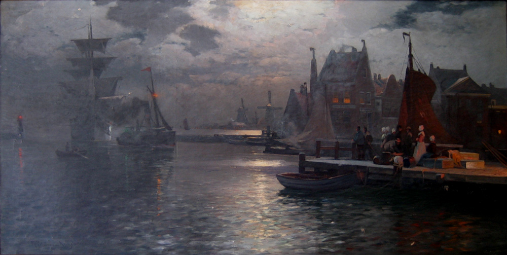 Der Hafen von Harlingen bei Mondschein